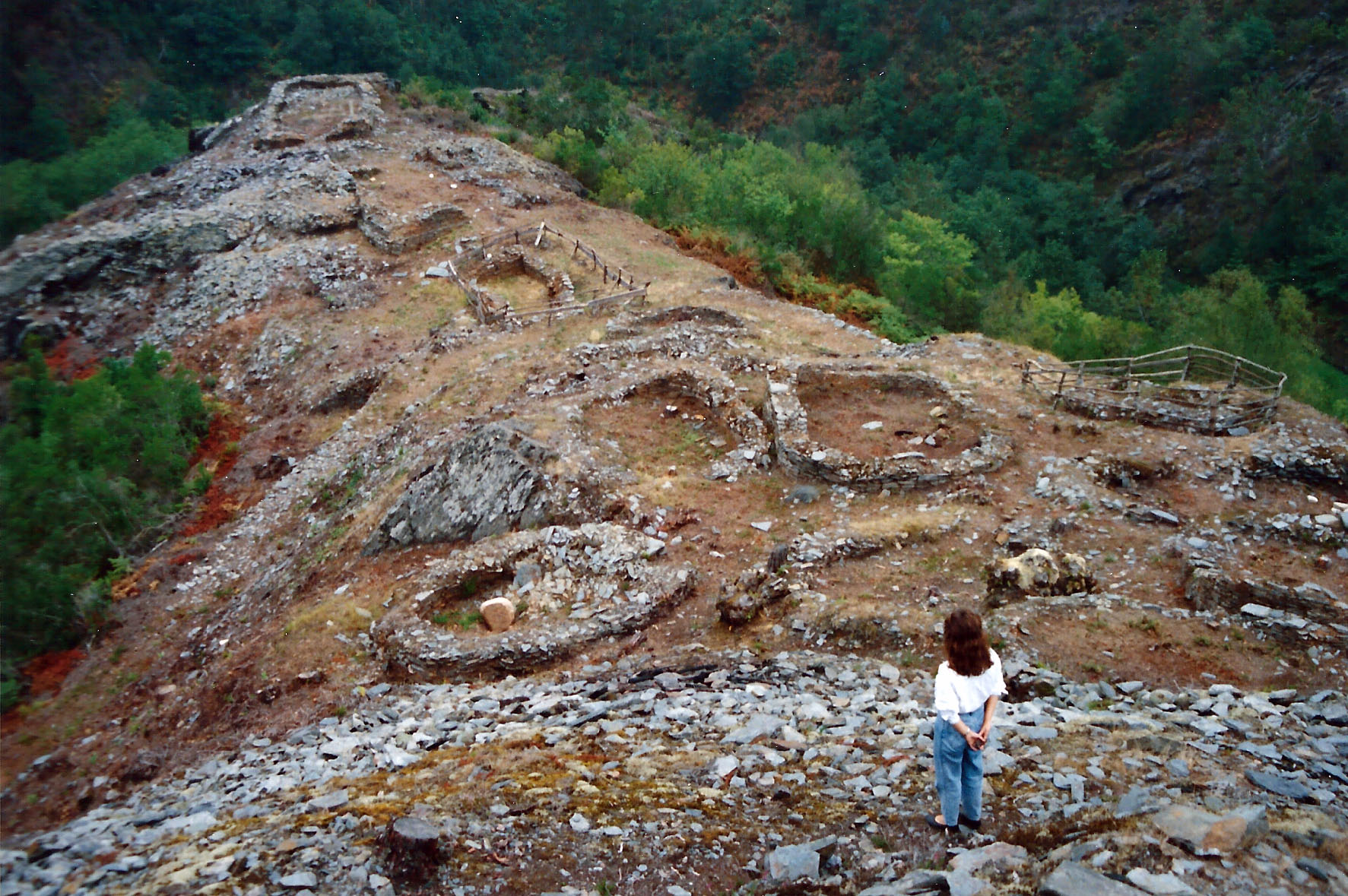 Castro de Pendía